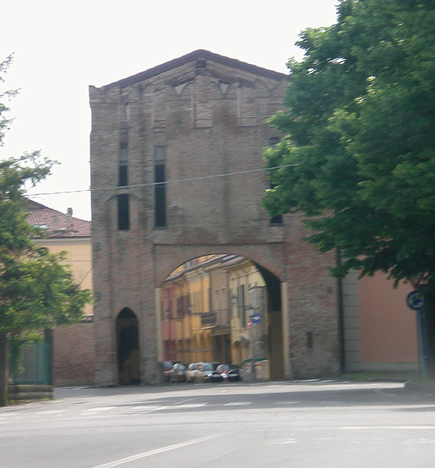 Porta Ferrara a Pieve di Cento